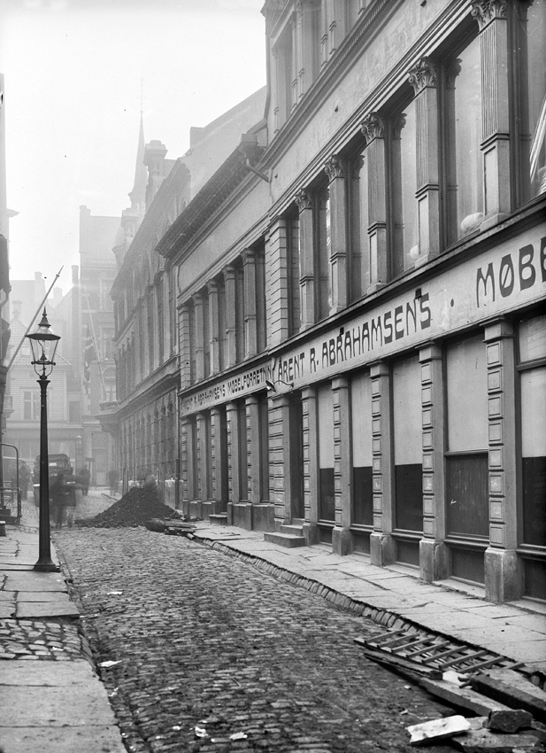 Gatebilde fra Østre Skostredet 5-7 i Bergen i 1927. Fotograf ukjent.